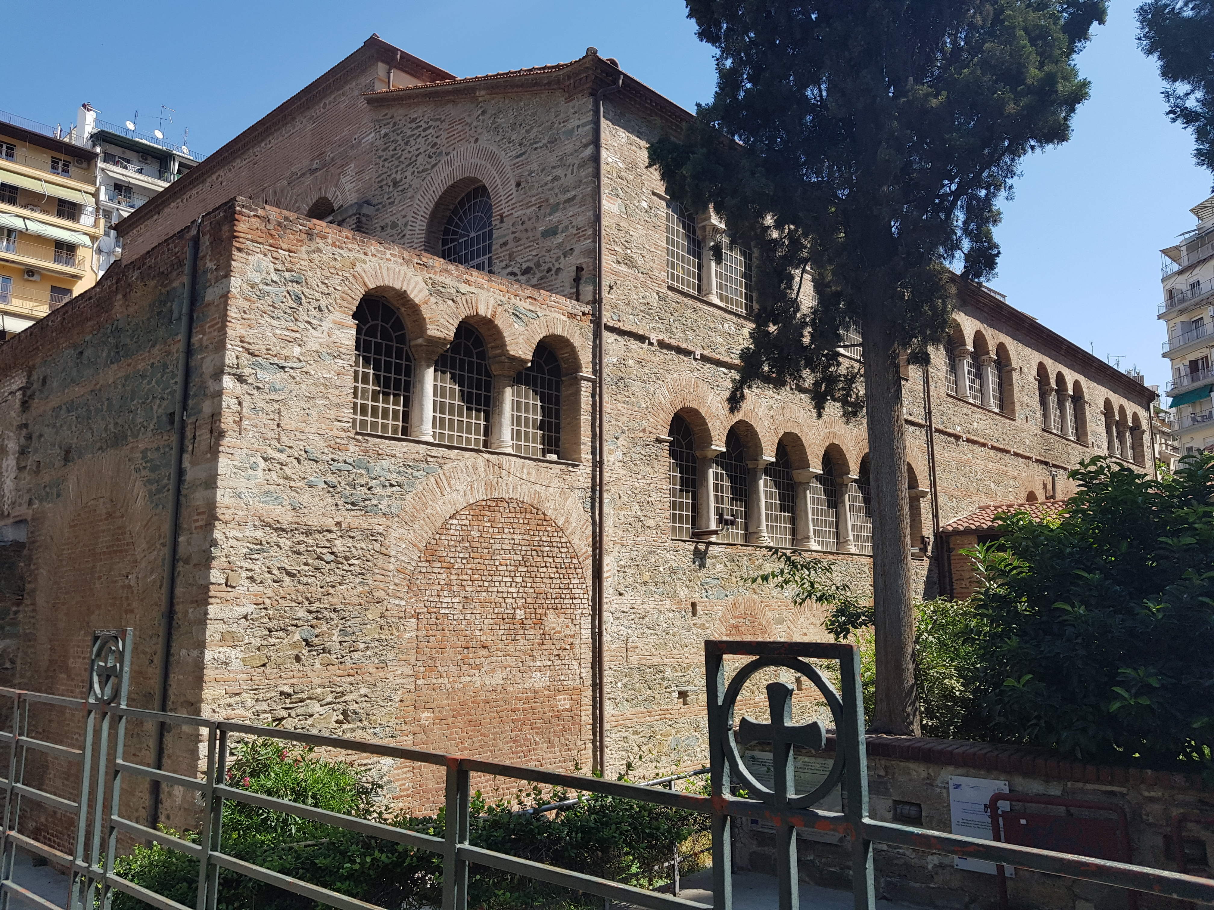 Αχειροποίητος«Αχειροποίητος»